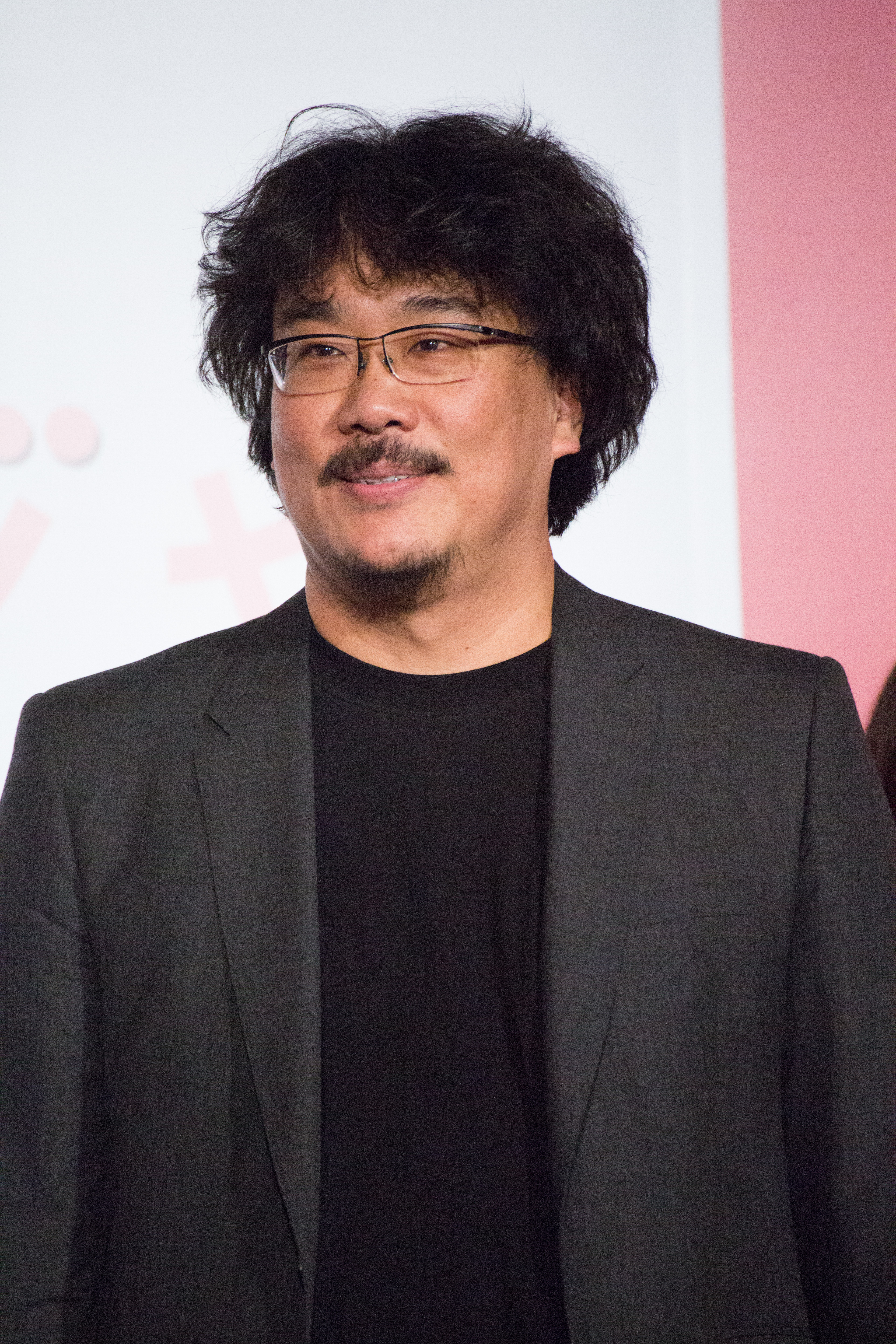 オクジャ/okja ジャパン・プレミア ポン・ジュノ